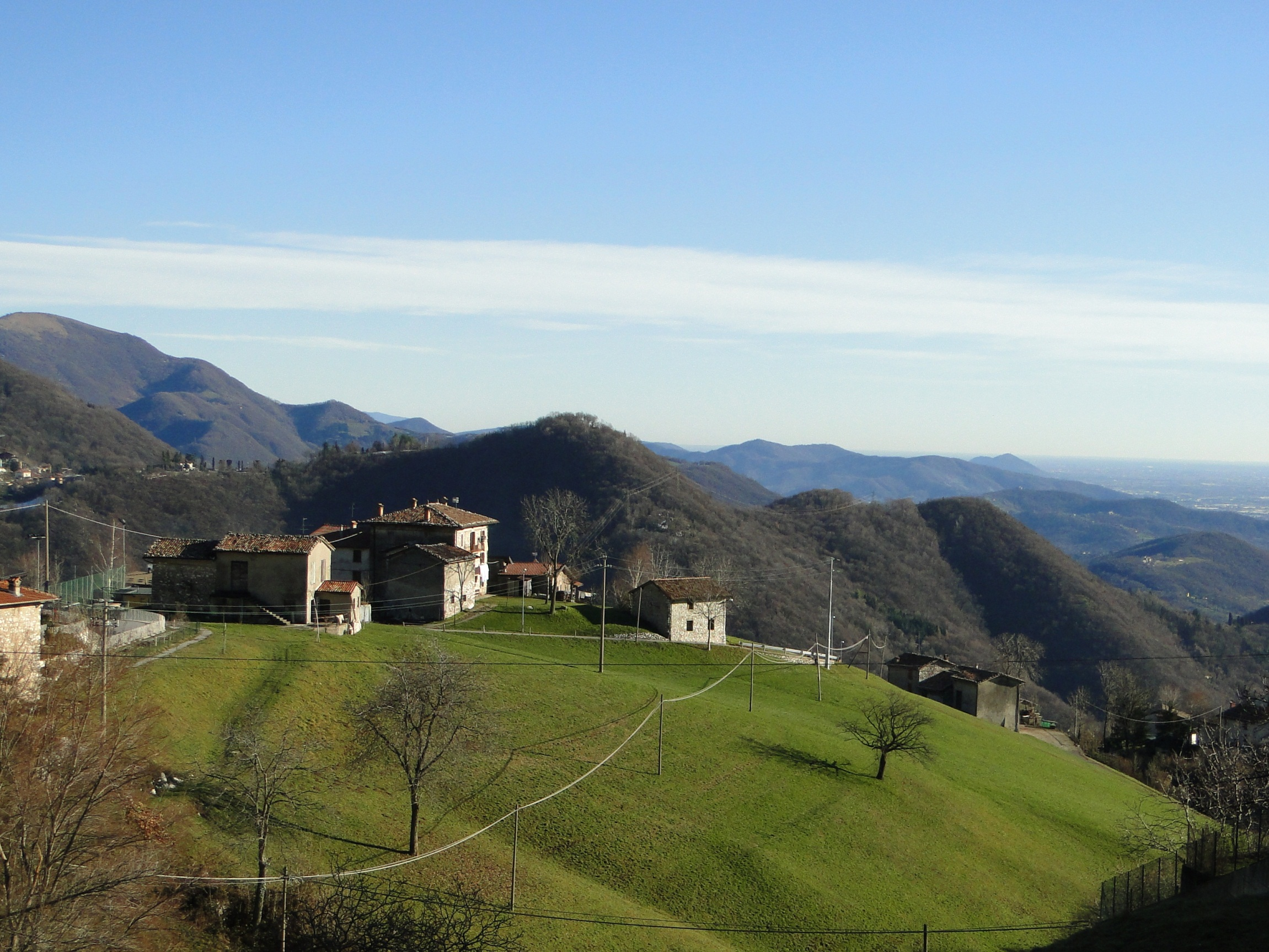 Monte di Nese, fraz. di Alzano Lombardo (BG). Panorama